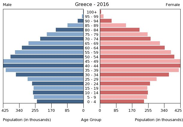 A population pyramid illustrates the age and sex structure of a country's population and may provide insights about political and social stability, as well as economic development. The population is distributed along the horizontal axis, with males shown on the left and females on the right. The male and female populations are broken down into 5-year age groups represented as horizontal bars along the vertical axis, with the youngest age groups at the bottom and the oldest at the top. The shape of the population pyramid gradually evolves over time based on fertility, mortality, and international migration trends.